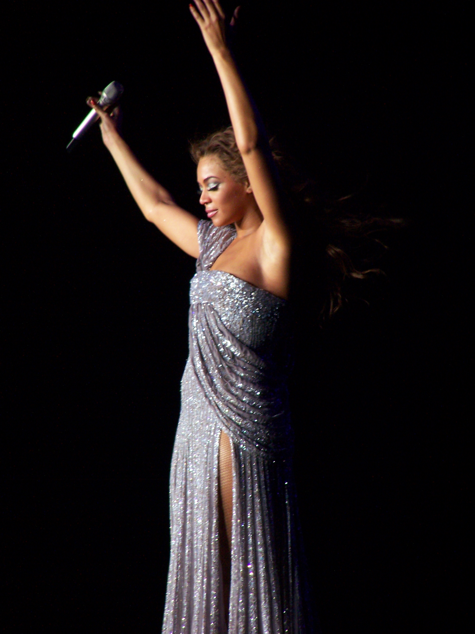 Beyoncé - Concert in 2007